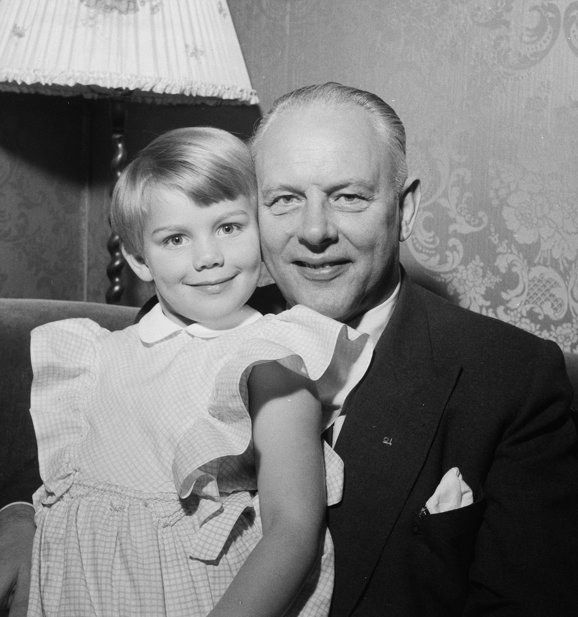 Hans Tetzner, oud-voetballer en chirurg. Met zijn oudste dochter.